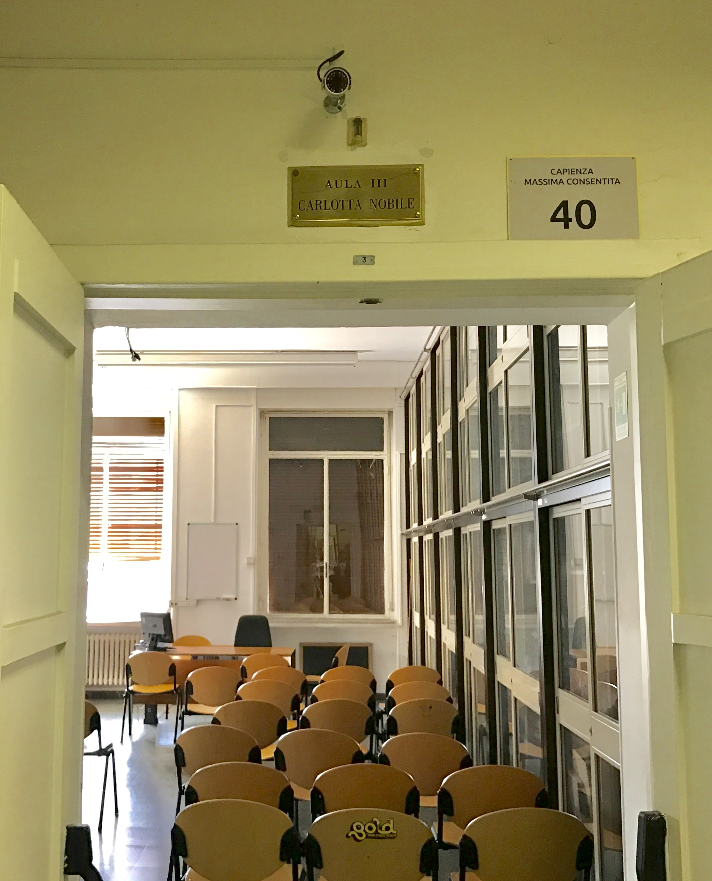 L'Aula tre del Dipartimento di Storia dell'Arte e dello Spettacolo dell'Università "La Sapienza" di Roma, intitolata, con solenne cerimonia avvenuta il 22 novembre 2014, a Carlotta Nobile (1988 + 2013) per «le sue raffinate ricerche sui rapporti tra musica, scrittura e arte».